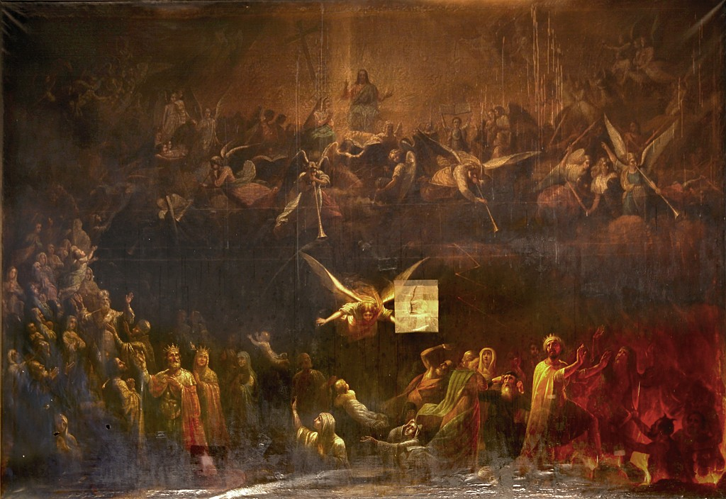 Страшный суд.